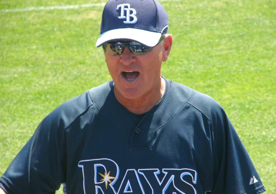 Joe Maddon